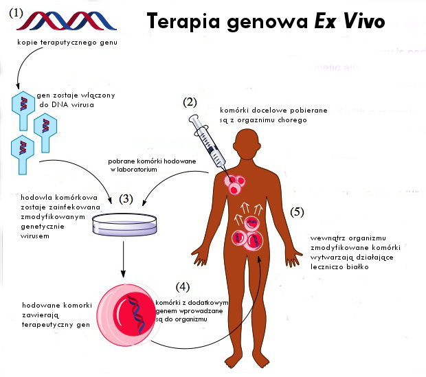 Terapia genowa ex vivo. Na podstawie pracy [1]